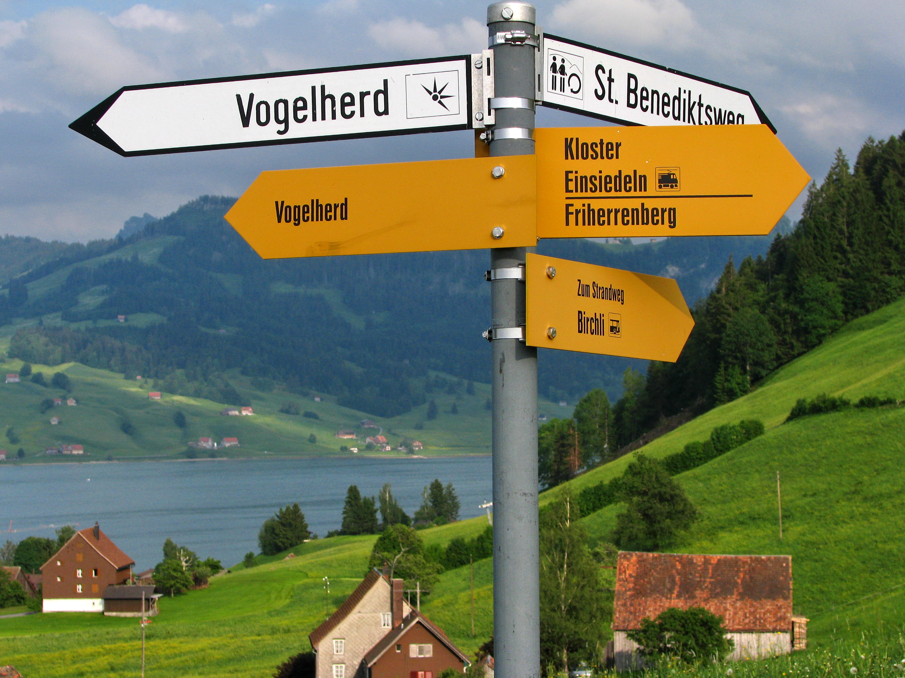 Einsiedeln (SZ) in Switzerland